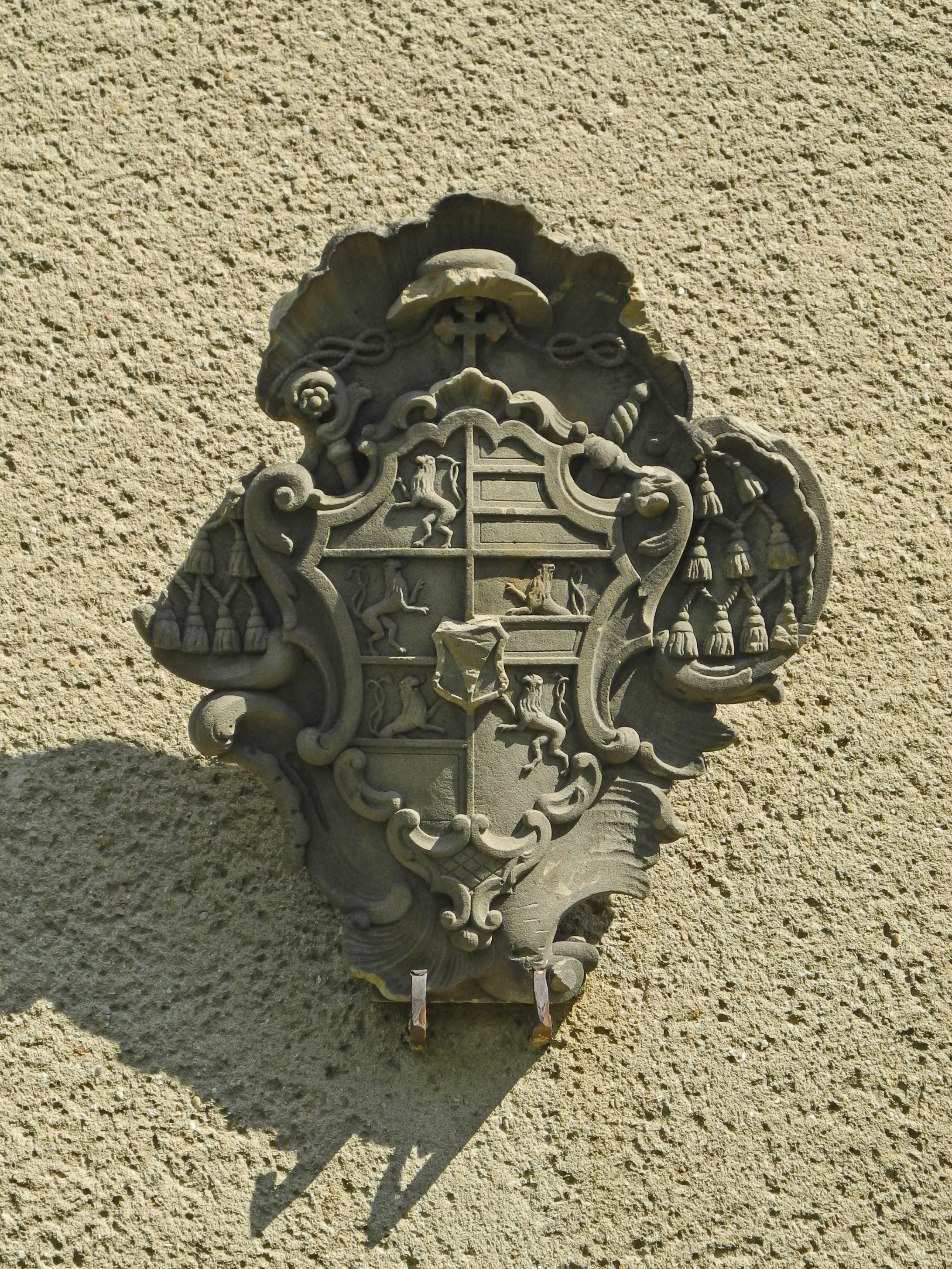 Wappen am Museum in Weißwasser in Schlesien (Bílá Voda)